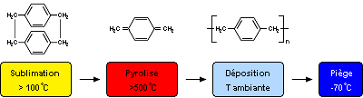 principe de déposition du parylène